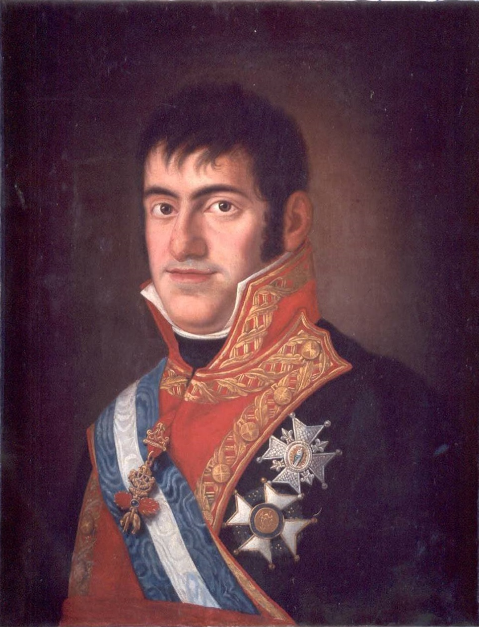 Retrato del rey Fernando VII de España (1784-1833), vestido con el uniforme de capitán general y luciendo, entre otras condecoraciones, la venera de la Orden del Toisón de Oro y la banda de la Orden de Carlos III.